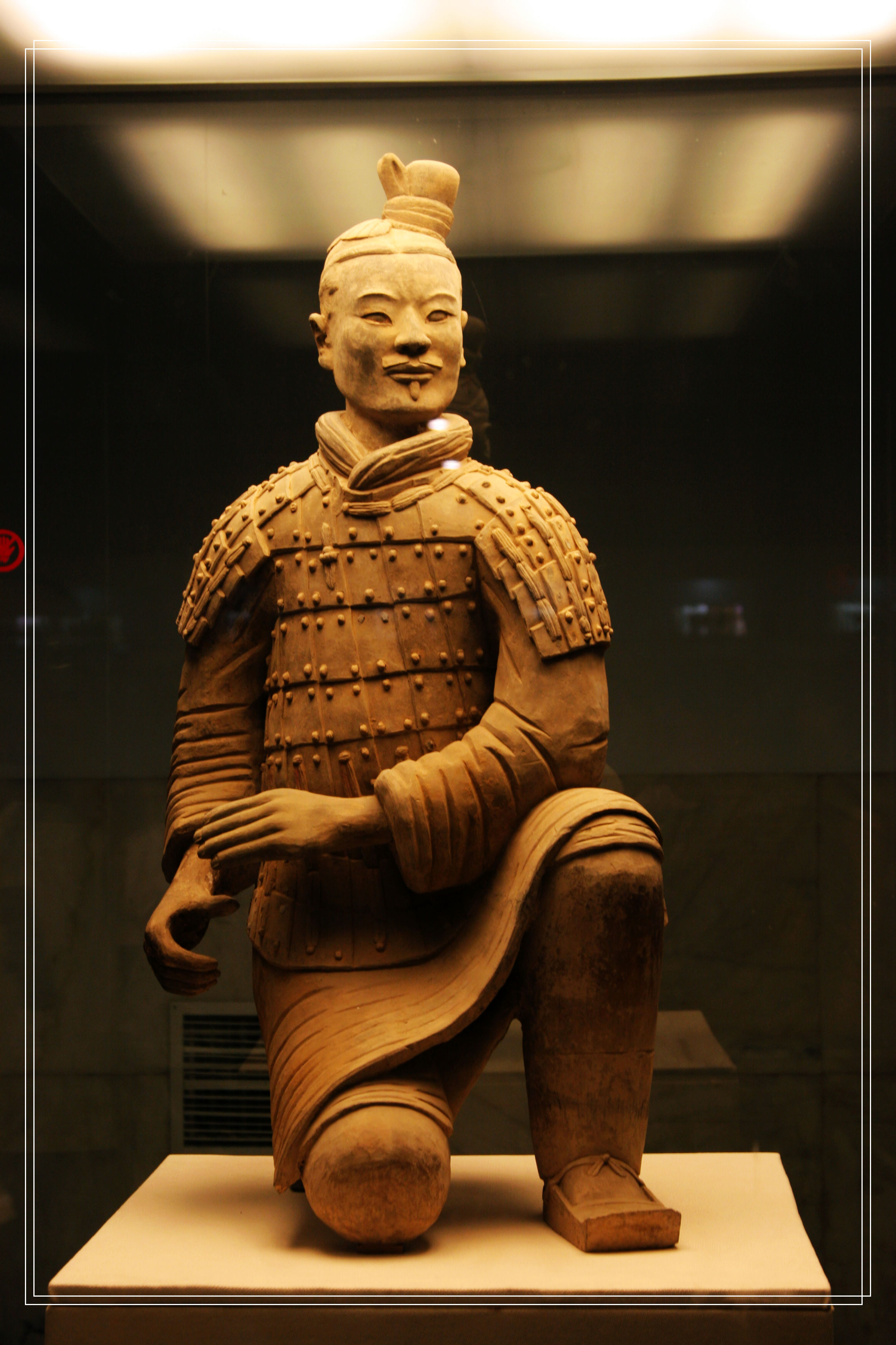 秦始皇兵马俑，跪射俑